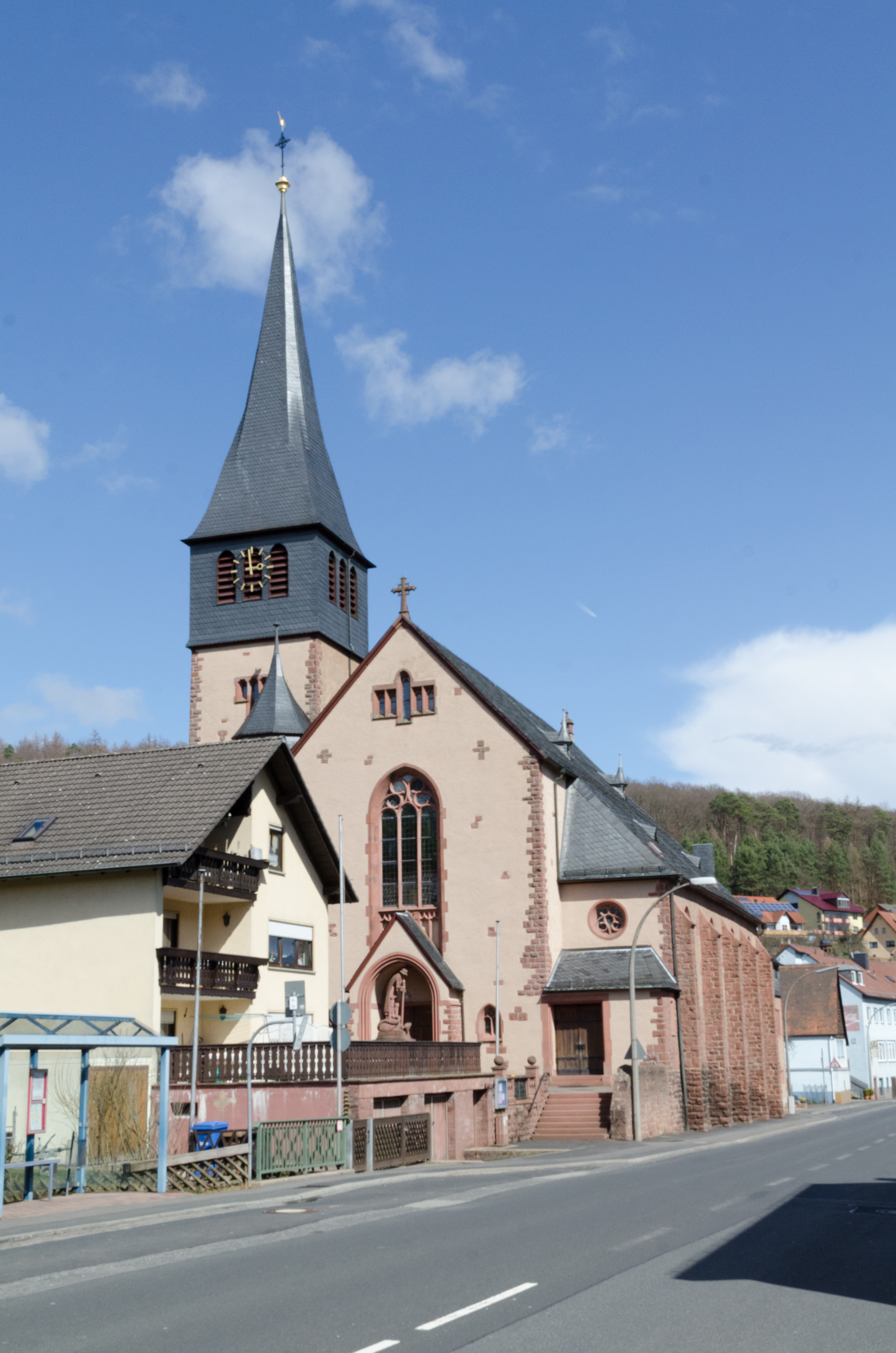 Rechtenbach, kath. Kirche